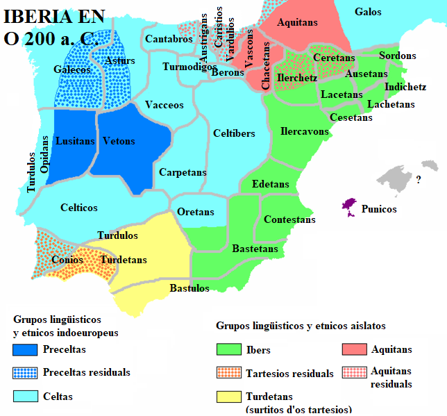 Aragonés: Iberia en o 200 a.C.